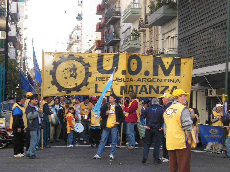 Marcha de la UOM (Unión Obrera Metalúrgica) de Argentina, Seccional La Matanza, en la ciudad de Buenos Aires.